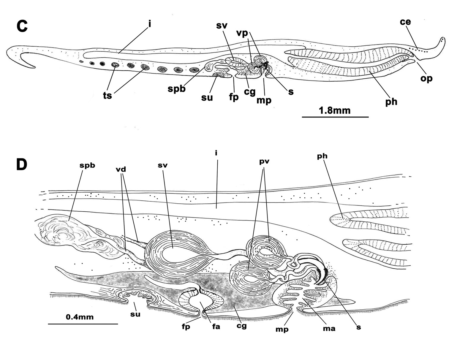 Prosthiostomum siphunculus. C: reconstrucción sagital de un espécimen D: reconstrucción sagital del aparato copulatorio. Abreviaturas: ce: ojos cerebrales; cg: glándulas de cemento; fa: atrium femenino; fp: poro femenino; i: intestino; ib: ramas intestinales; ma: atrium masculino; mp: poro masculino; op: poro oral; ph: farínge; pv: vesícula prostática; s: estilete peniano; spb: bulbos de esperma; su: ventosa; sv: vesícula seminal; ts: testículos; v: vagina; vd: conducto deferente Noreña C, Marquina D, Perez J, Almon B (2014) First records of Cotylea (Polycladida, Platyhelminthes) for the Atlantic coast of the Iberian Peninsula. ZooKeys 404: 1-22.